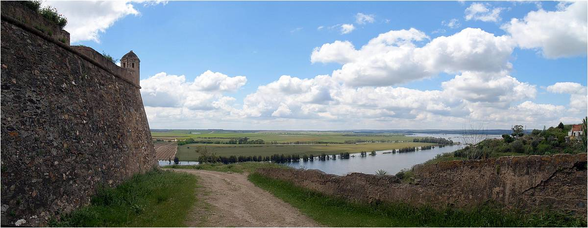 Juromenha